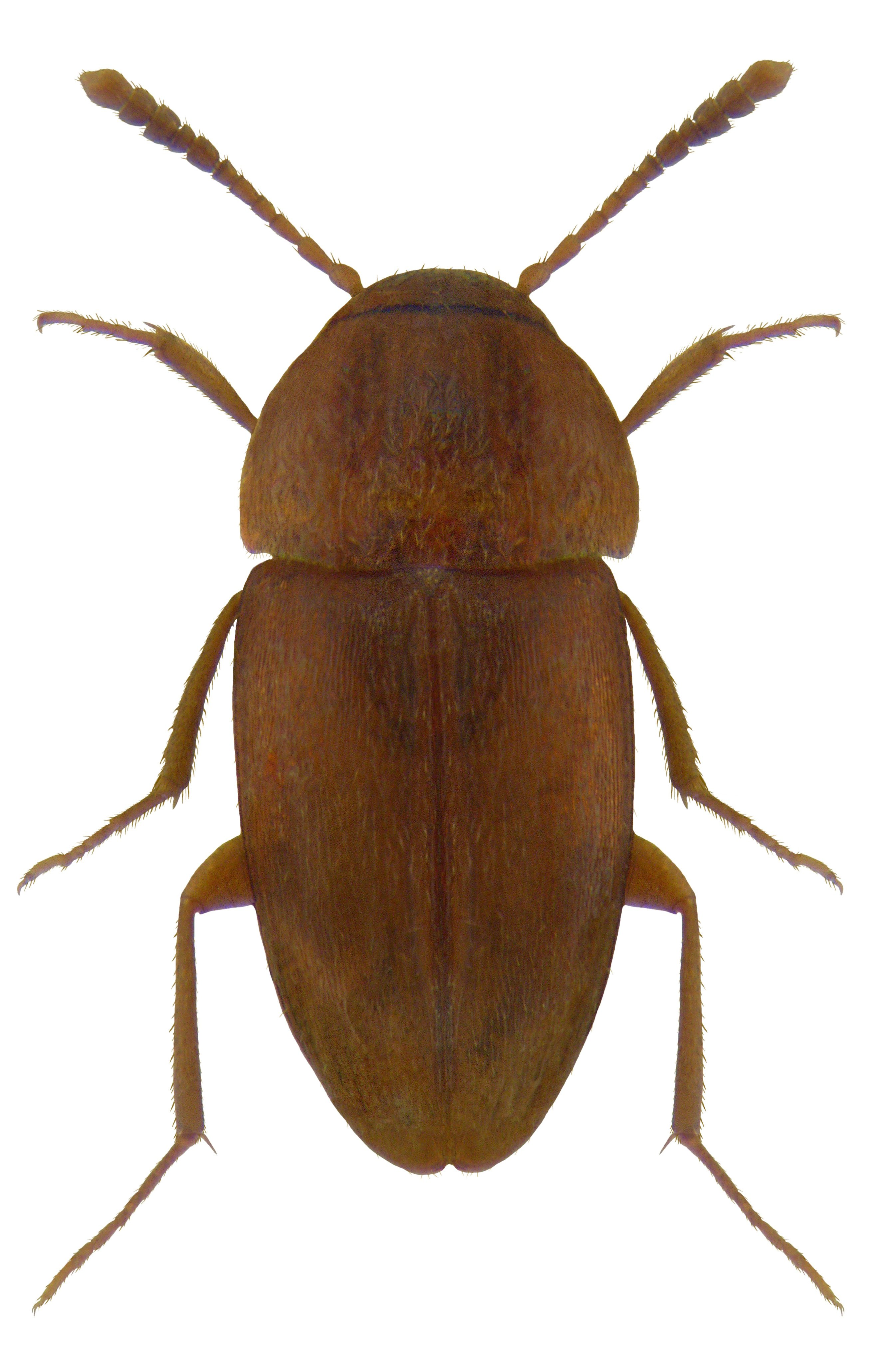 Familie: Cholevidae Grösse: 2,2-2,4 mm Verbreitung: Europa, nicht selten Ökologie: an faulenden Pflanzenresten in lichten Wäldern Fundort: Germania, Bayern, Oberfranken, Kulmbach leg.det. U.Schmidt, 1981 Foto: U.Schmidt, 2009